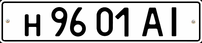 Номерной знак частных лиц Украины, стандарт 1992 года